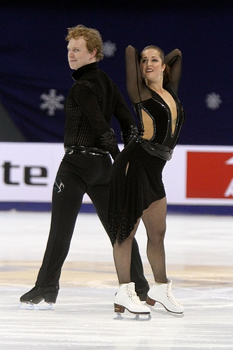 Эмили Самуэльсон и Тодд Жиллес на Кубке Китая 2011